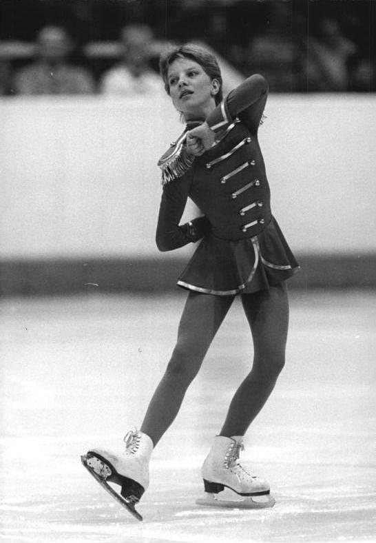 Tanja Krienke ADN-ZB Oberst 2.10.87 Berlin: Internationales Schaulaufen- Teilnehmer aus der UdSSR, der CSSR, der UVR, der VRP, aus Österreich und der DDR gaben bei einem Internationalen Schaulaufen am 1.10.87 im Berliner Sportforum Proben ihres großen Könnens. DDR-Nachwuchsläuferin Tanja Krienke bei ihrer Kür. -Siehe auch Motiv 1987-1002-19 und 20N